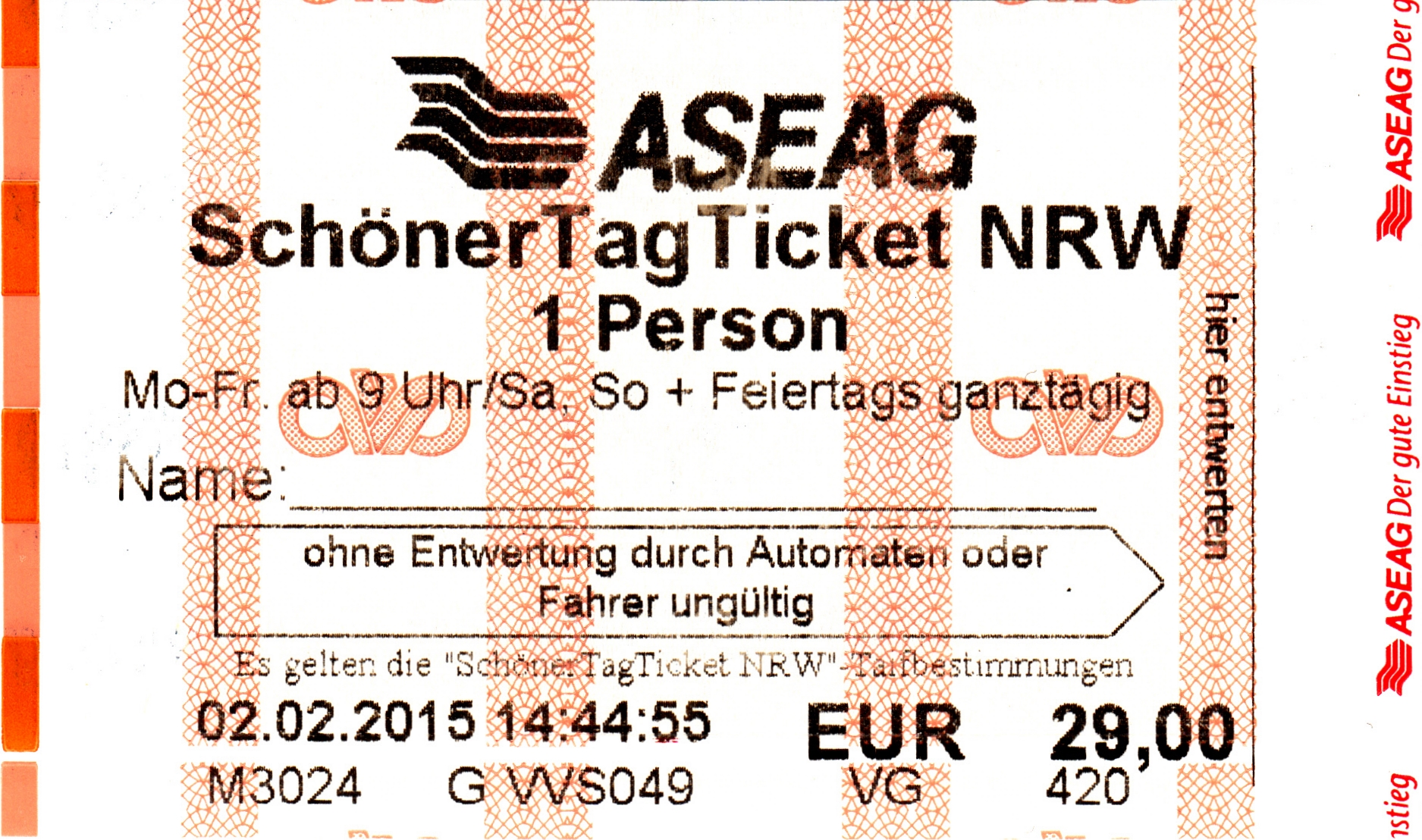 Schöner Tag Ticket NRW-Tarif für eine Person. Ausgegeben durch die Aachener Straßenbahn und Energieversorgungs-AG (ASEAG)